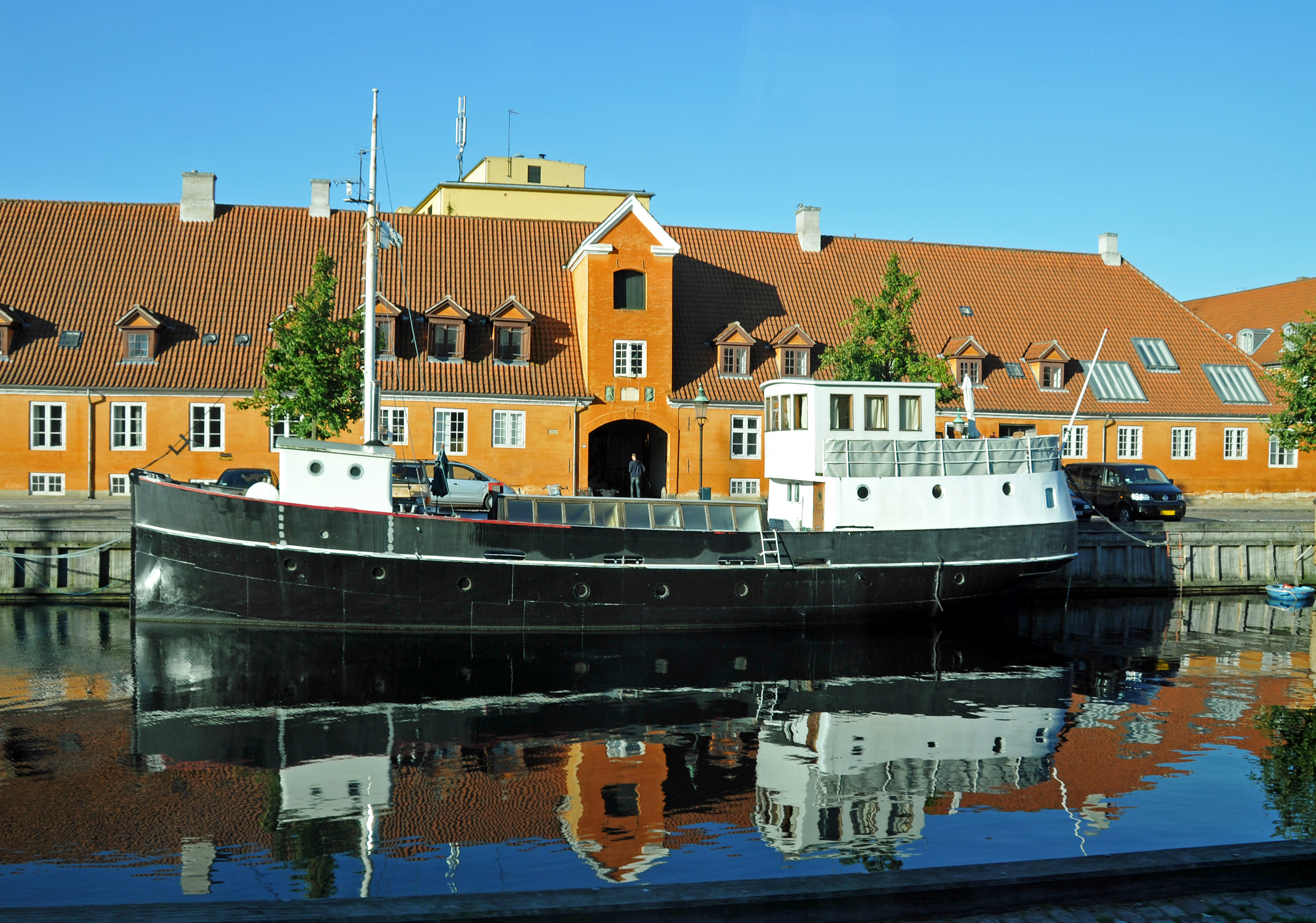 Frederiksholms Kanal no. 28 - one of the buildings of Fæstningens Materielgård at Frederiksholms Kanal in Copenhagen, Denmark